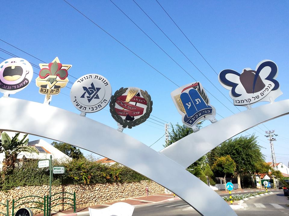 פסל תנועות הנוער בנס ציונה. הפסל הוא ישראל פרימו